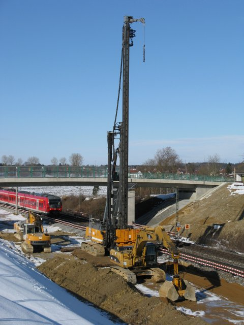 Bauarbeiten an der KBS 980 nahe der Brücke bei Hattenhofen